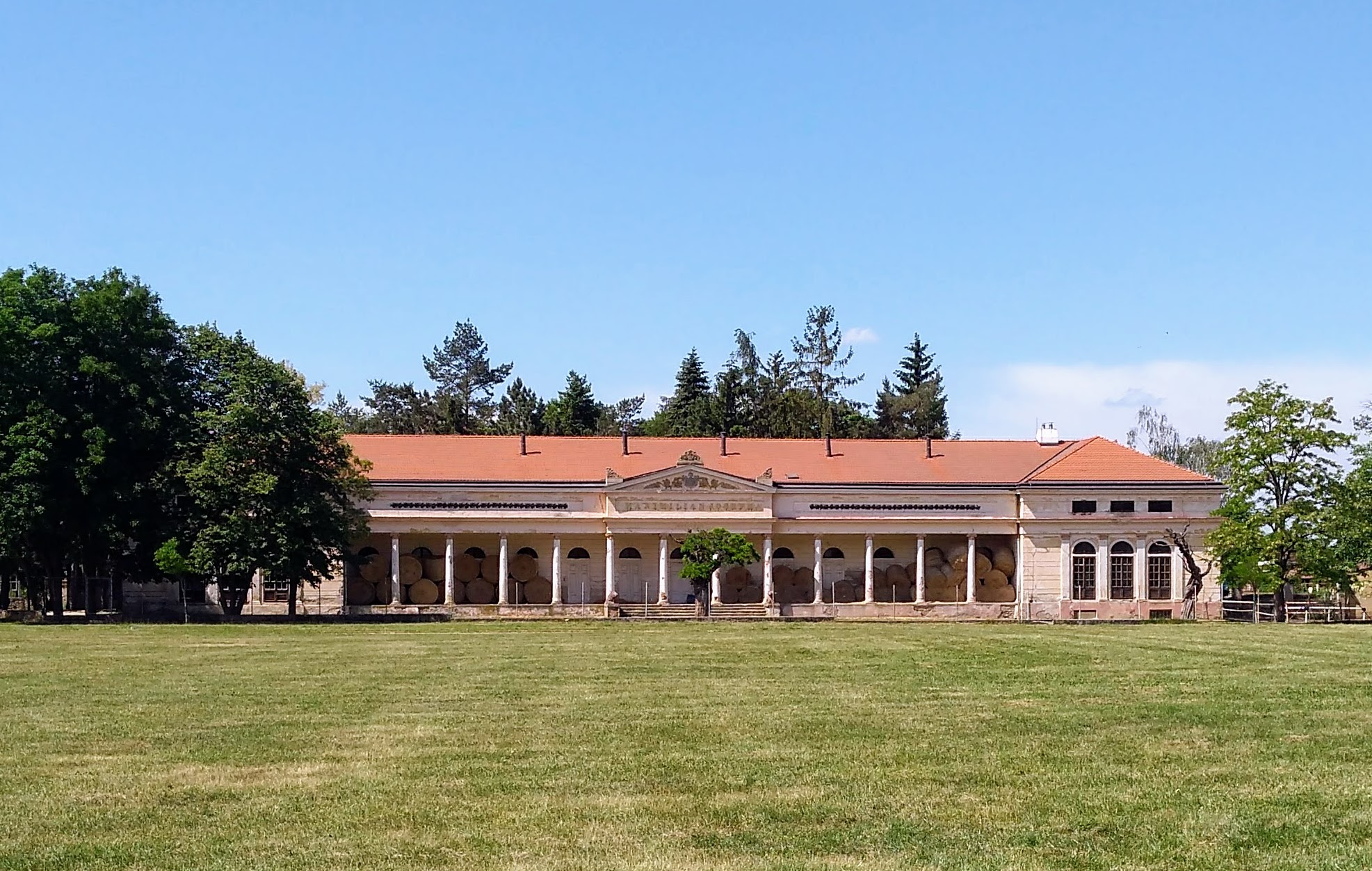 Maxmiliánův dvůr Kroměříž vzorová stavba 1841–1845, Anton Arche Zámek Kroměříž, Sněmovní náměstí 1/2, 2/4, Třebízského 1344/2, Zámecká zahrada 1478/2, 1477/4, 1476/6, 1501/10, Kroměříž.